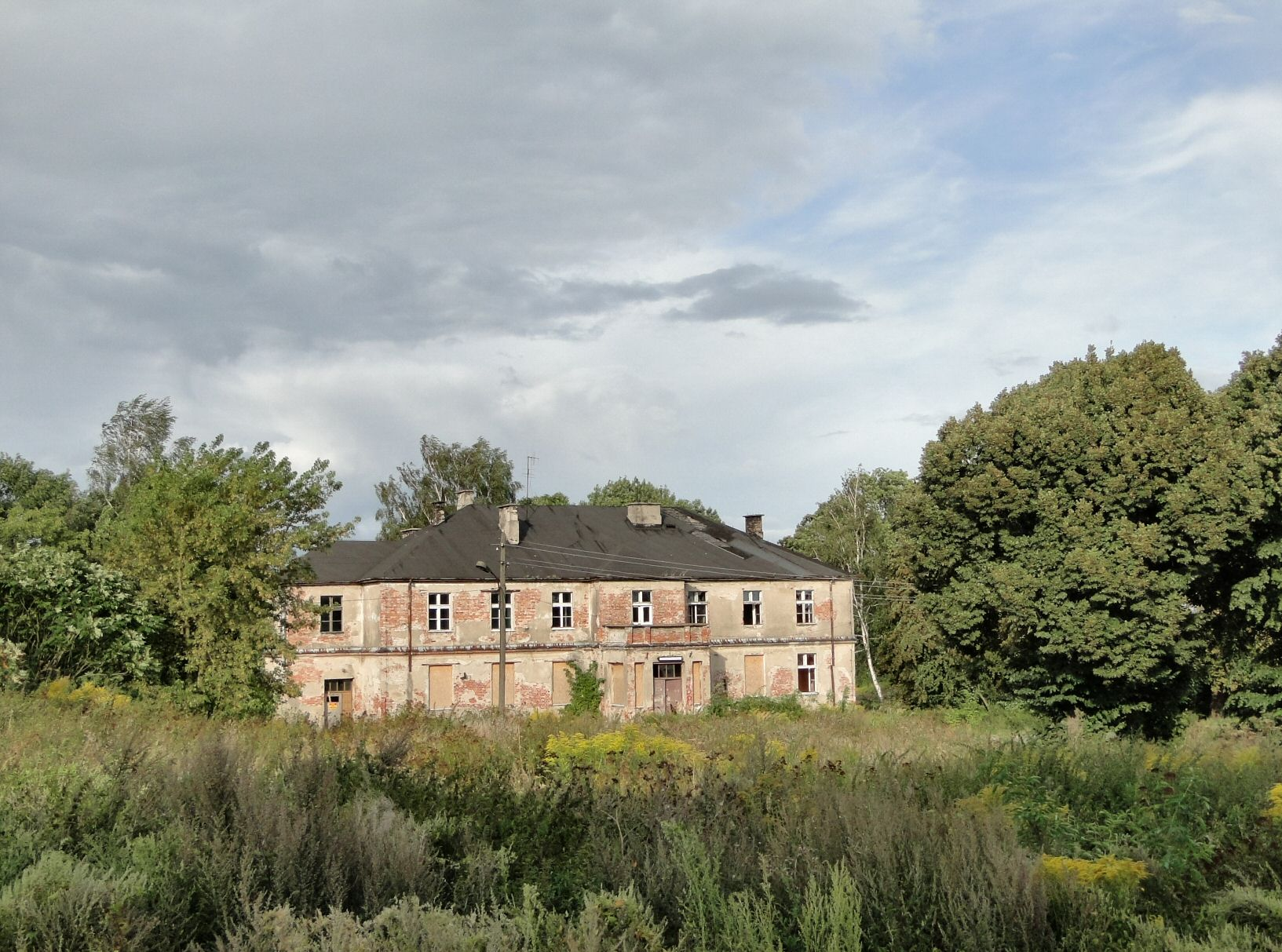 Szczecin - dwór z dziedzińcem folwarcznym przy ul. Łącznej 4 (Sienno)